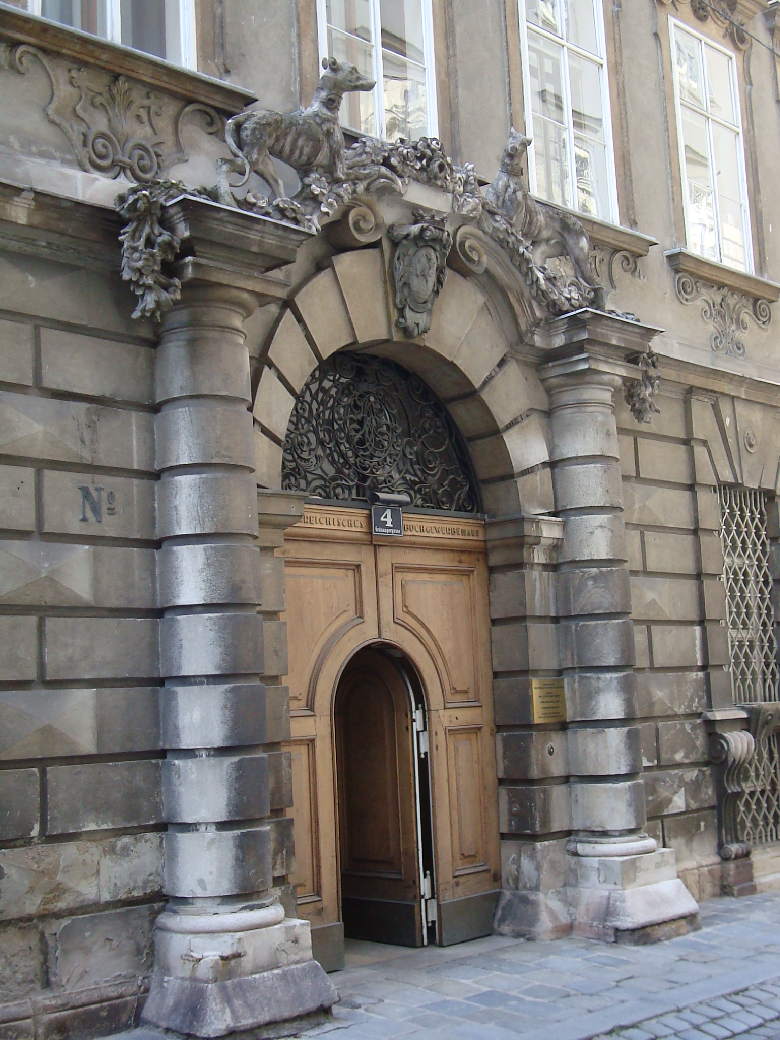 Palais Hatzenberg-Fürstenberg in der Grünangergasse/Domgasse1